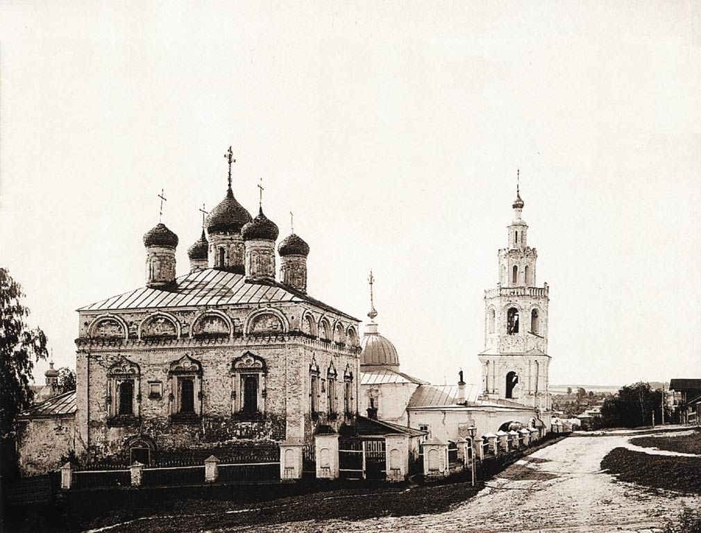 Собор Михаила Архангела (Чебоксары) Николаевский (второй) собор (Церковь Иоанна Предтечи) с колокольней (1690 г.) Автор: М.П. Дмитриев, 1894 г.